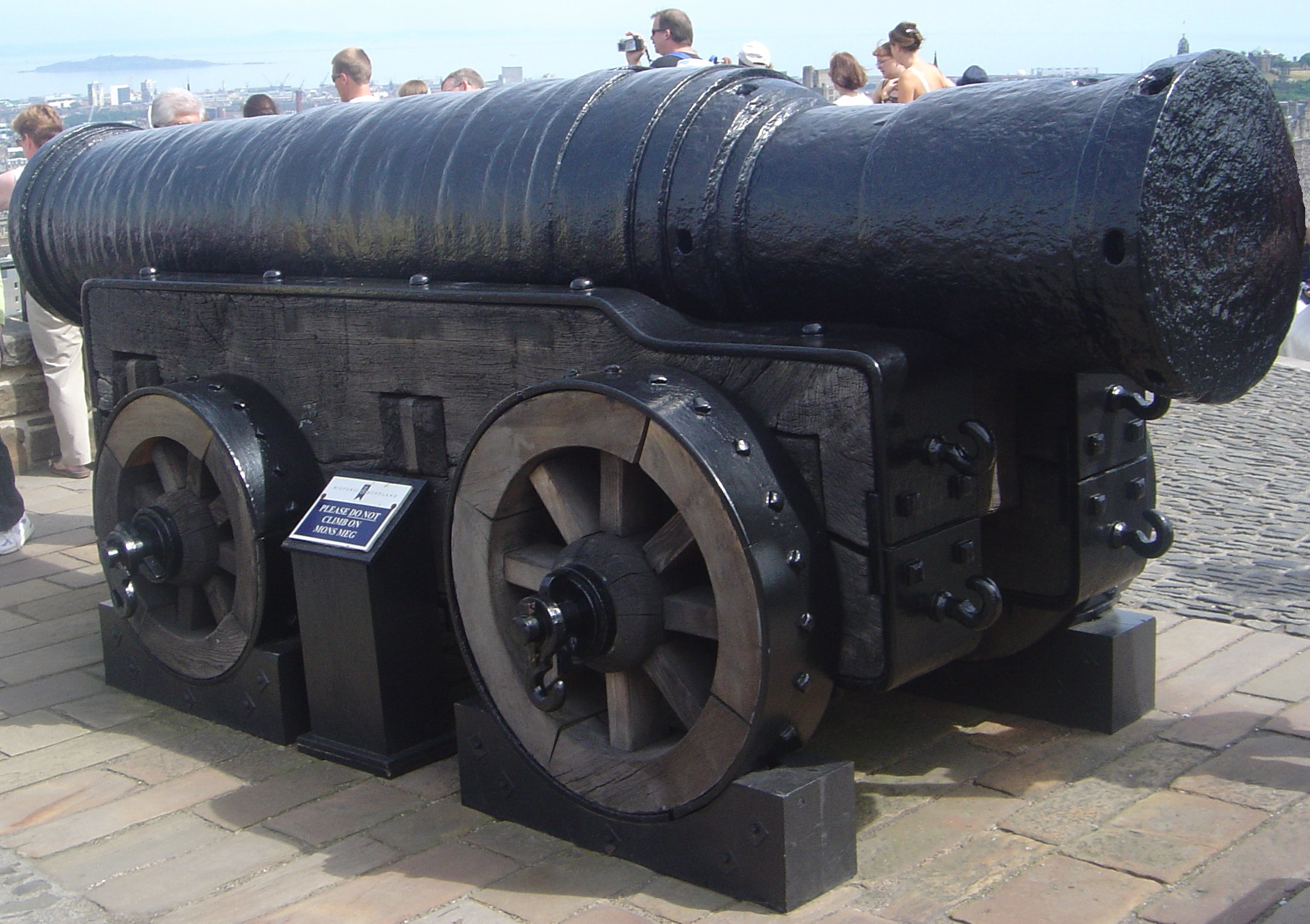 Edinburgh Castle, Mons Meg gun